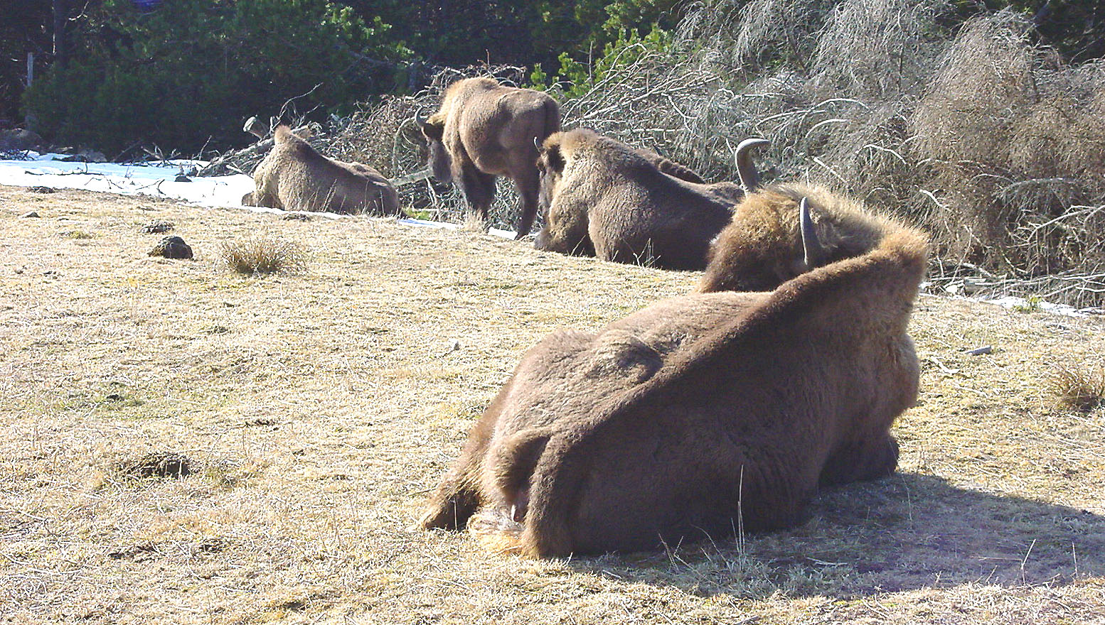 bisons polonais réintroduit en semi liberté en France (Margeride, Lozère).